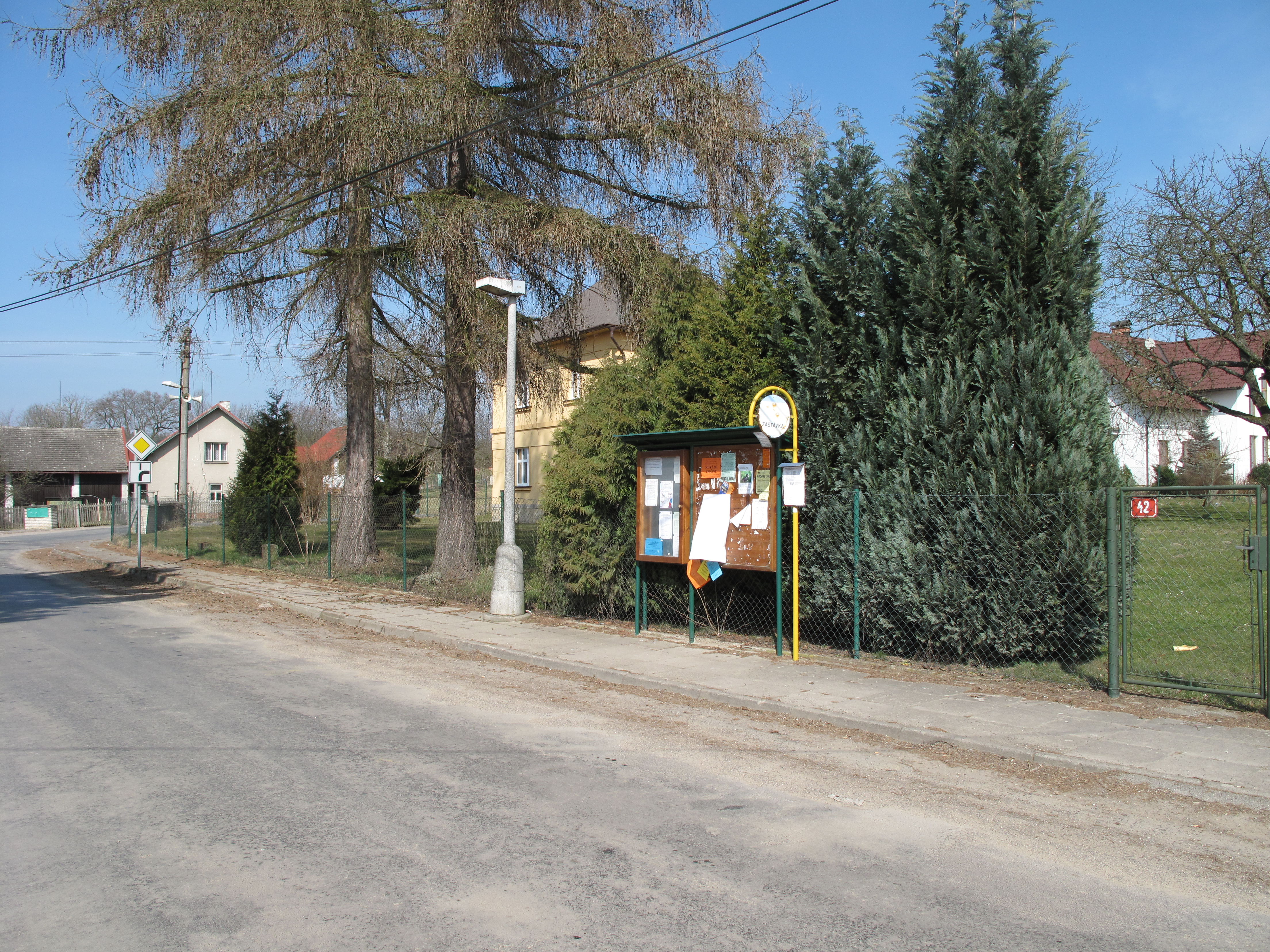 Zastávka v Chocnějovicích. Okres Mladá Boleslav, Česká republika.